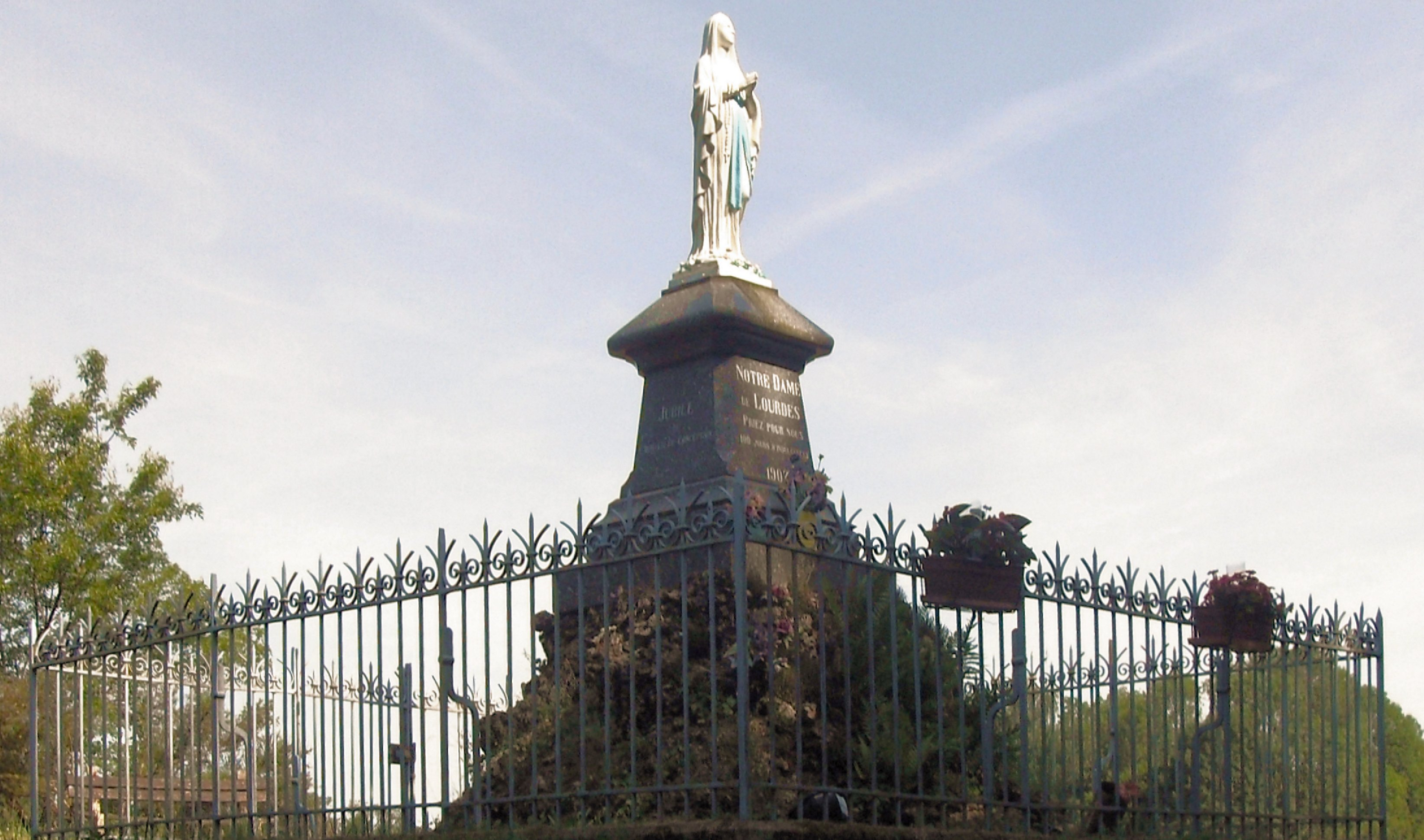 Calvaire de la Vierge au Haut de la Côte, village des Fessey